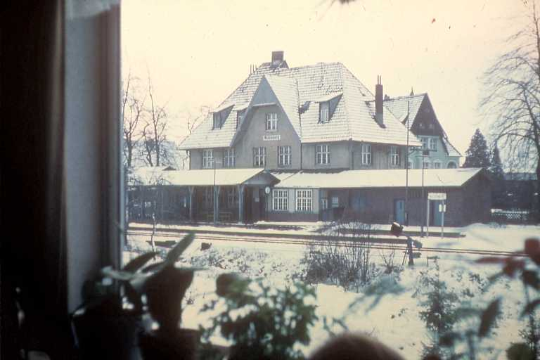 Bahnhof Wassenberg 1972 * Quelle: Sammlung B.Dohmen, Archiv-Nr. G8 * Fotograf: Paul Hüsges * Copyright Status: GNU Freie Dokumentationslizenz